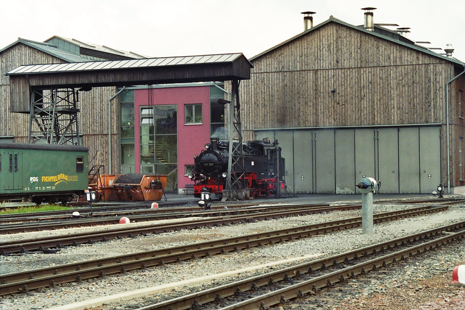 Train station in Oberwiesenthal